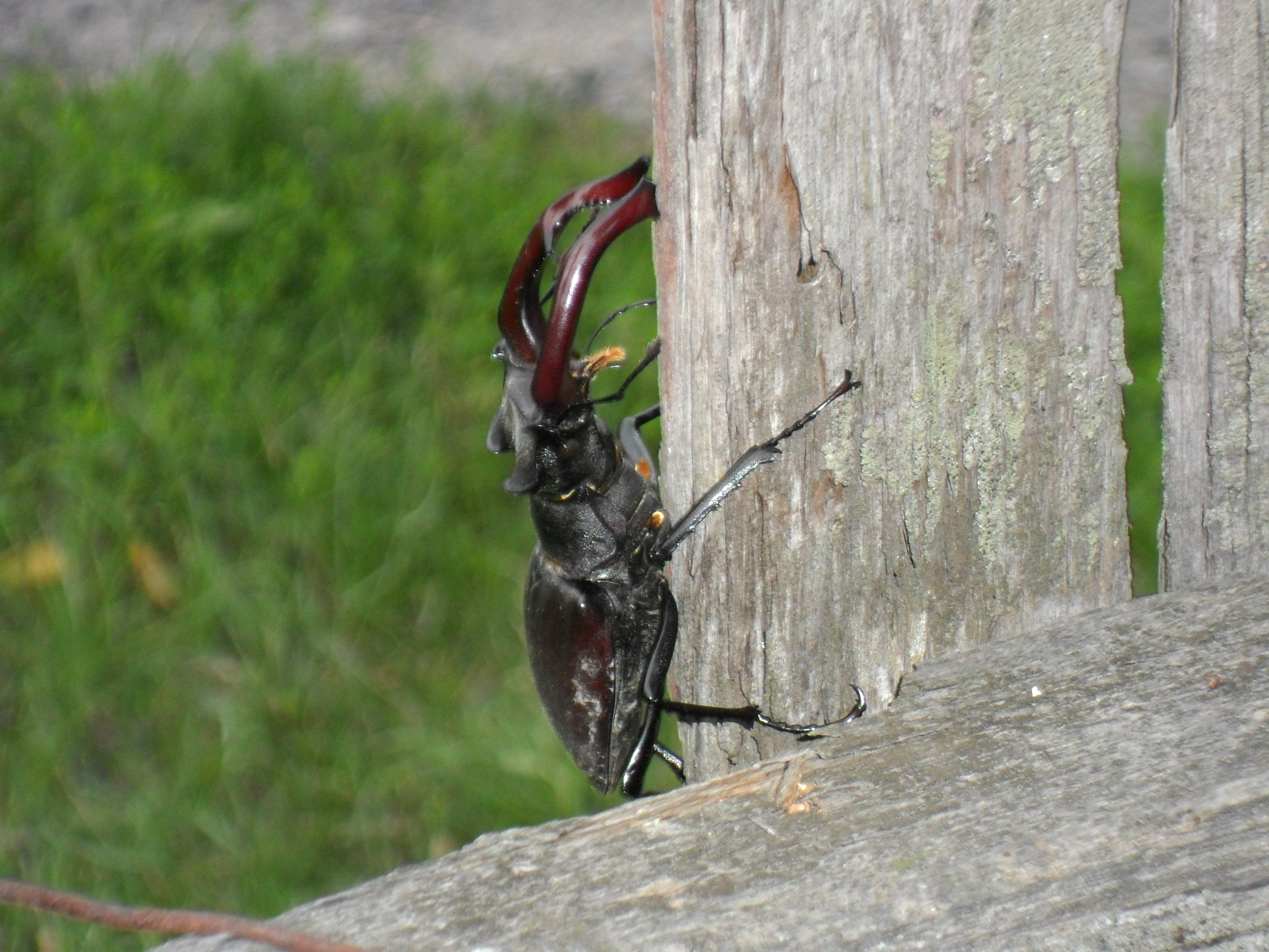 Жук-олень (Lucanus cervus) - представник лісостепу, Зіньківський район